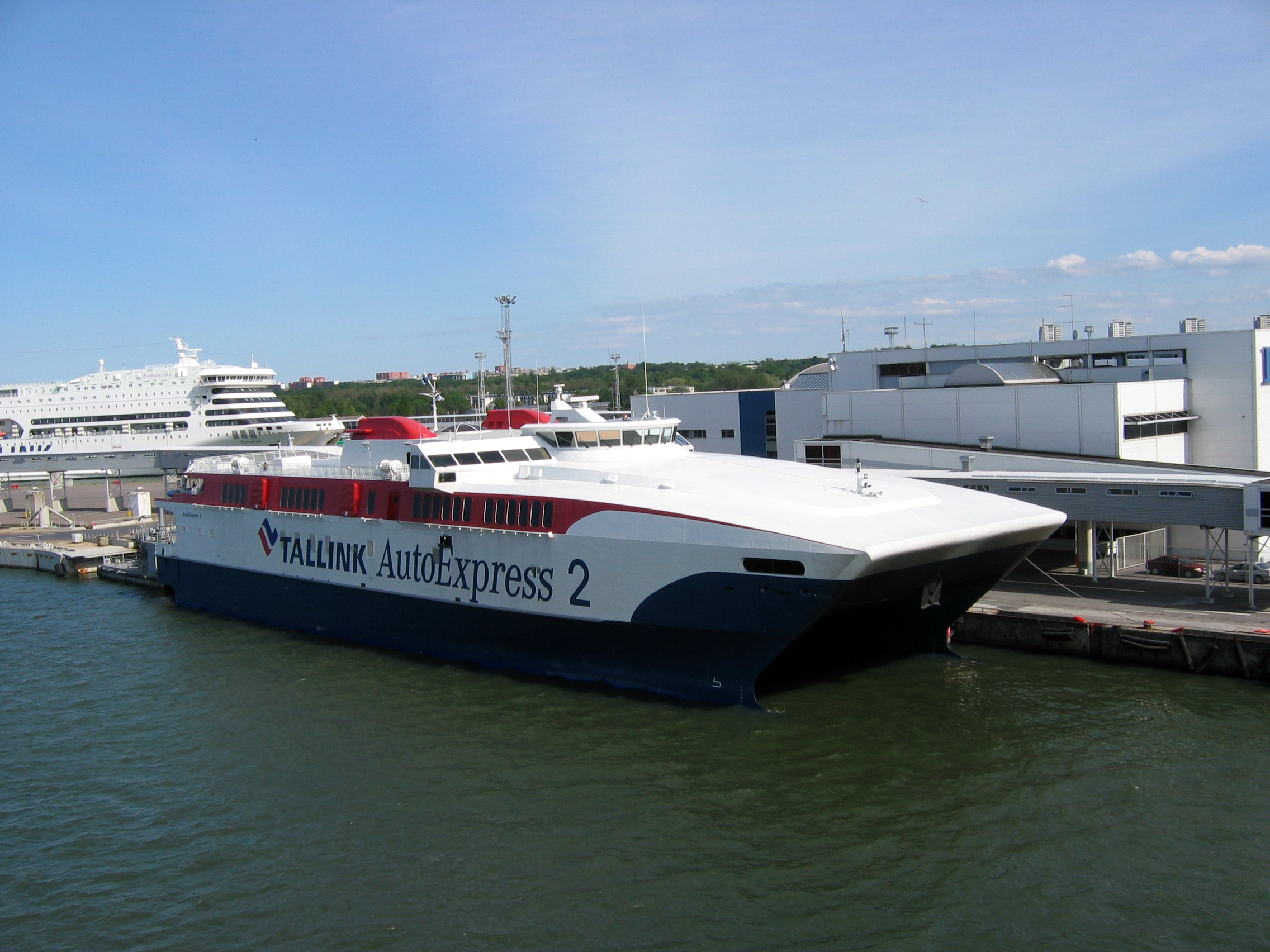 Tallinn Sommer 2007